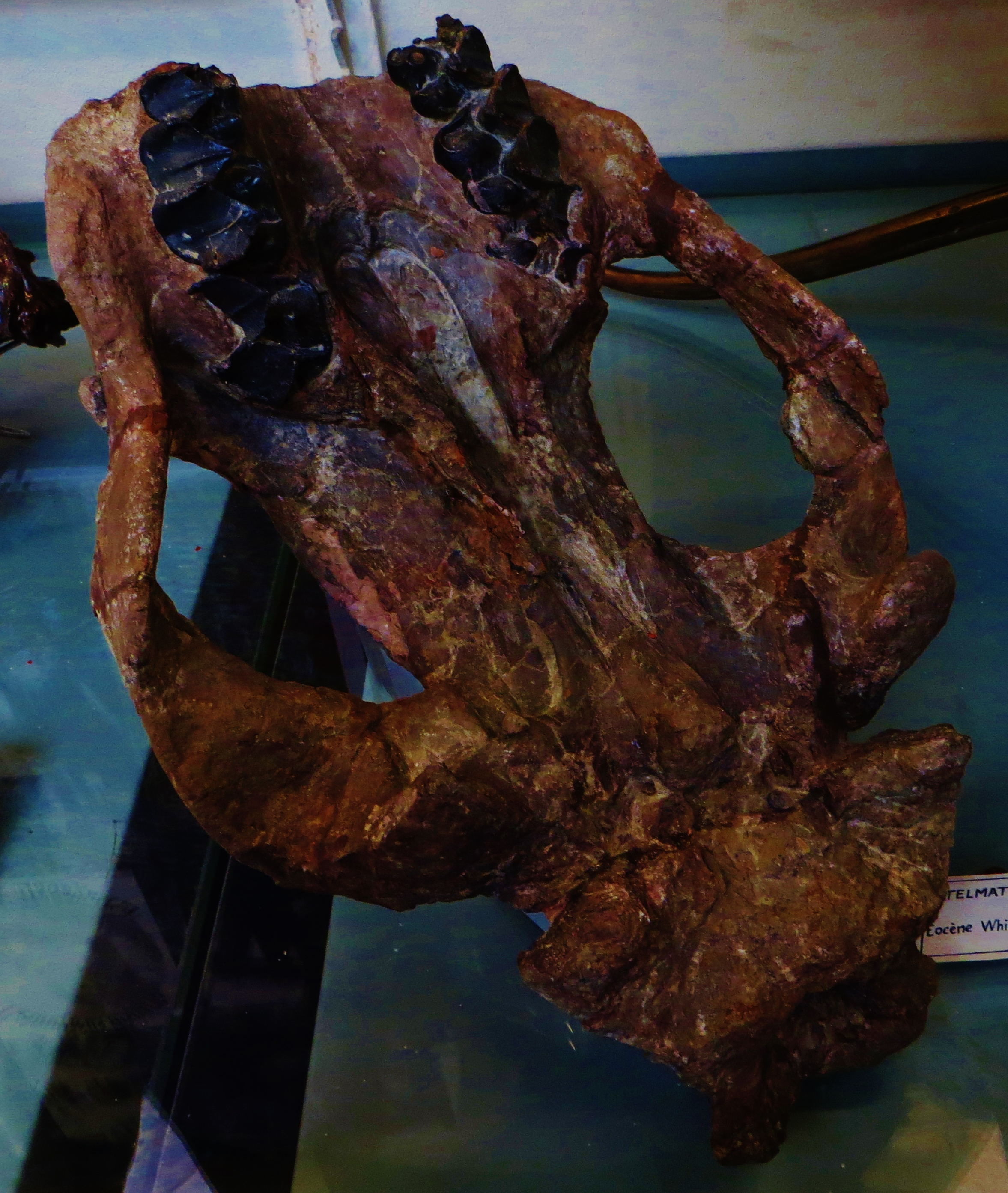 Fossil of Telmatherium, an extinct mammal- Took the photo at Musee d'Histoire Naturelle, Paris